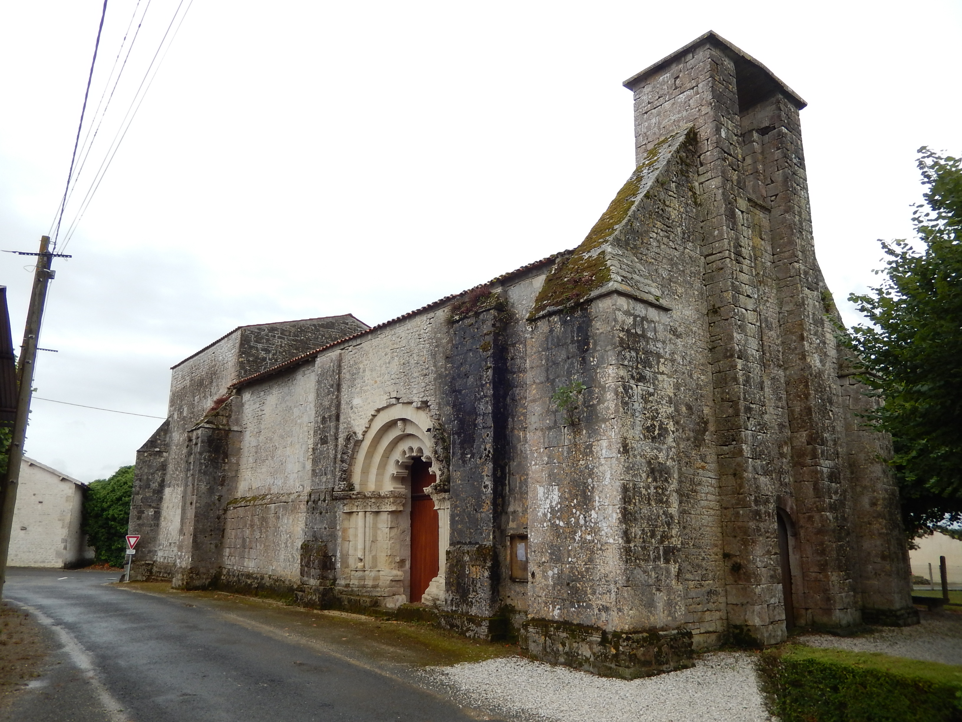 L'église Saint-Martin d'Aujac, en Charente-Maritime.